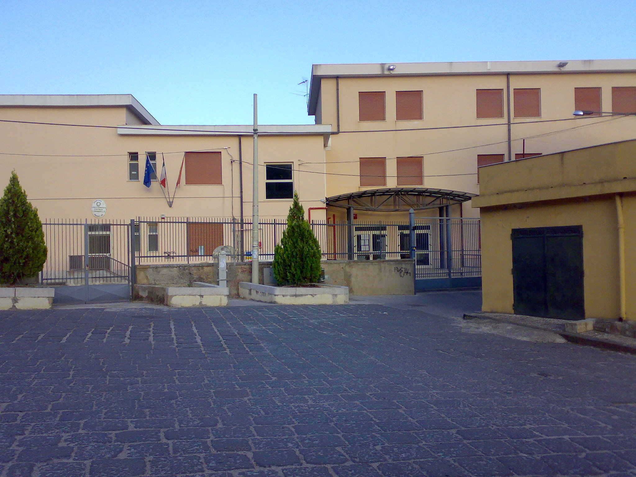 Liceo Ginnasio Statale "Luigi Pirandello"